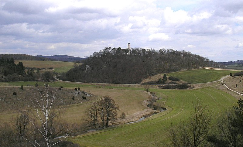 Der Michelsberg bei Fronhofen im Kesseltal (Bayerisch-Schwaben).